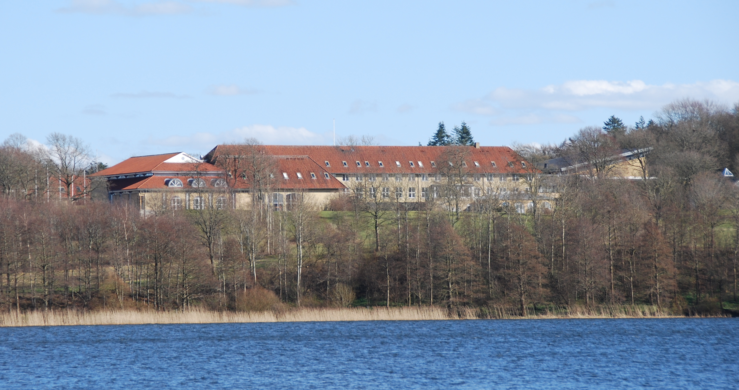 Viborg Gymnastik Højskole set fra modsatte side af Søndersø i Viborg.